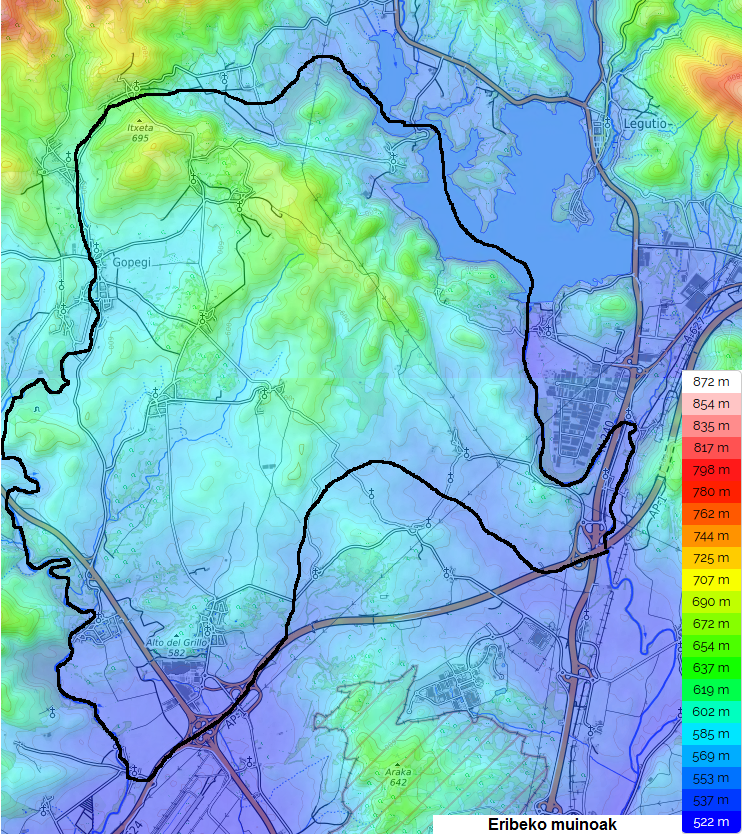 Eribeko muinoen mapa topografikoa.